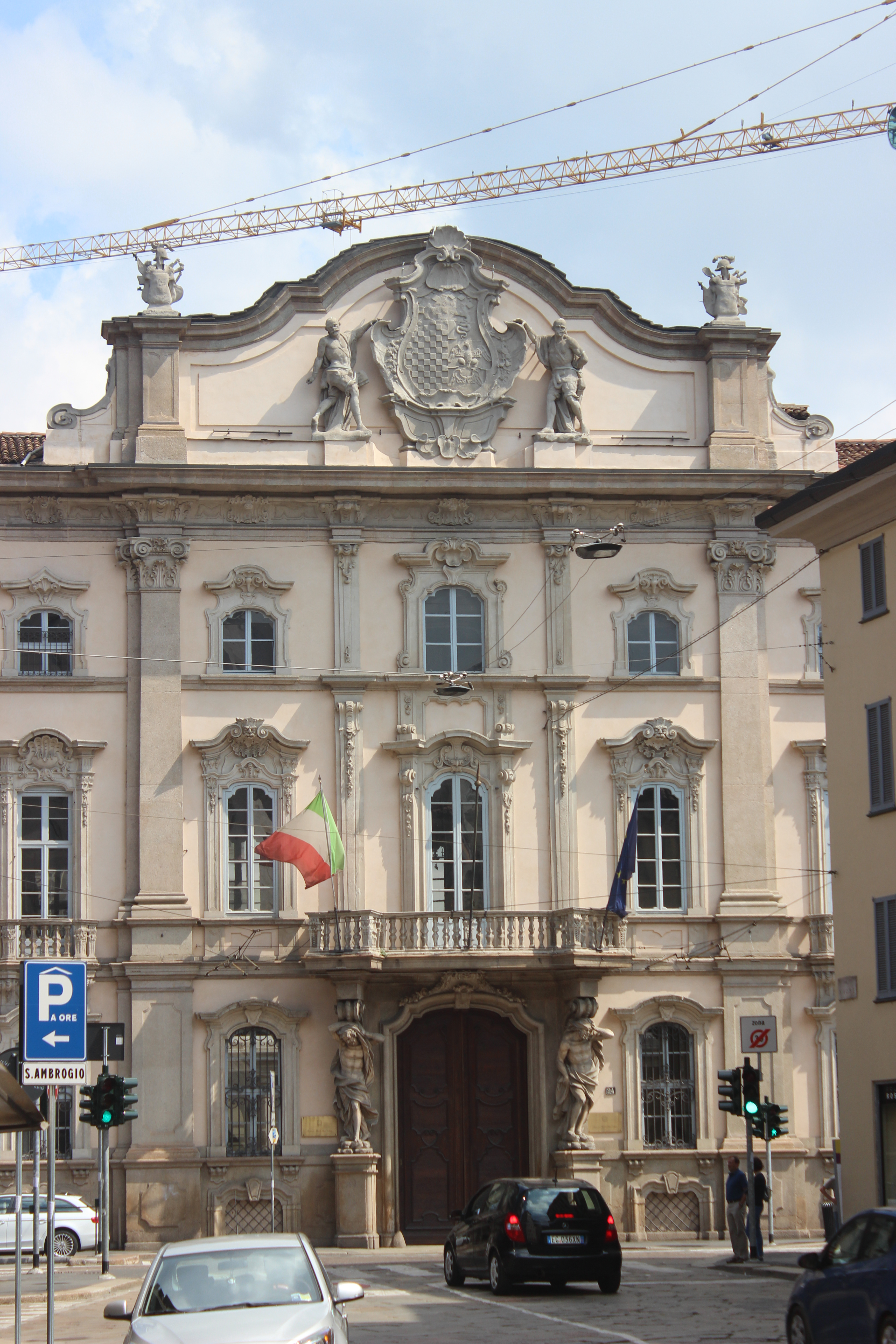 Milán. Palazzo Litta. Fachada.